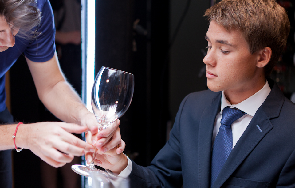 Arnaud Jouan dans Incompatibles un film de Paolo Cedolin Petrini